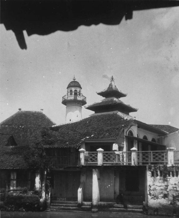 Foto. Masjid di kawasan komunitas Arab ("kampung Arab") di Semarang